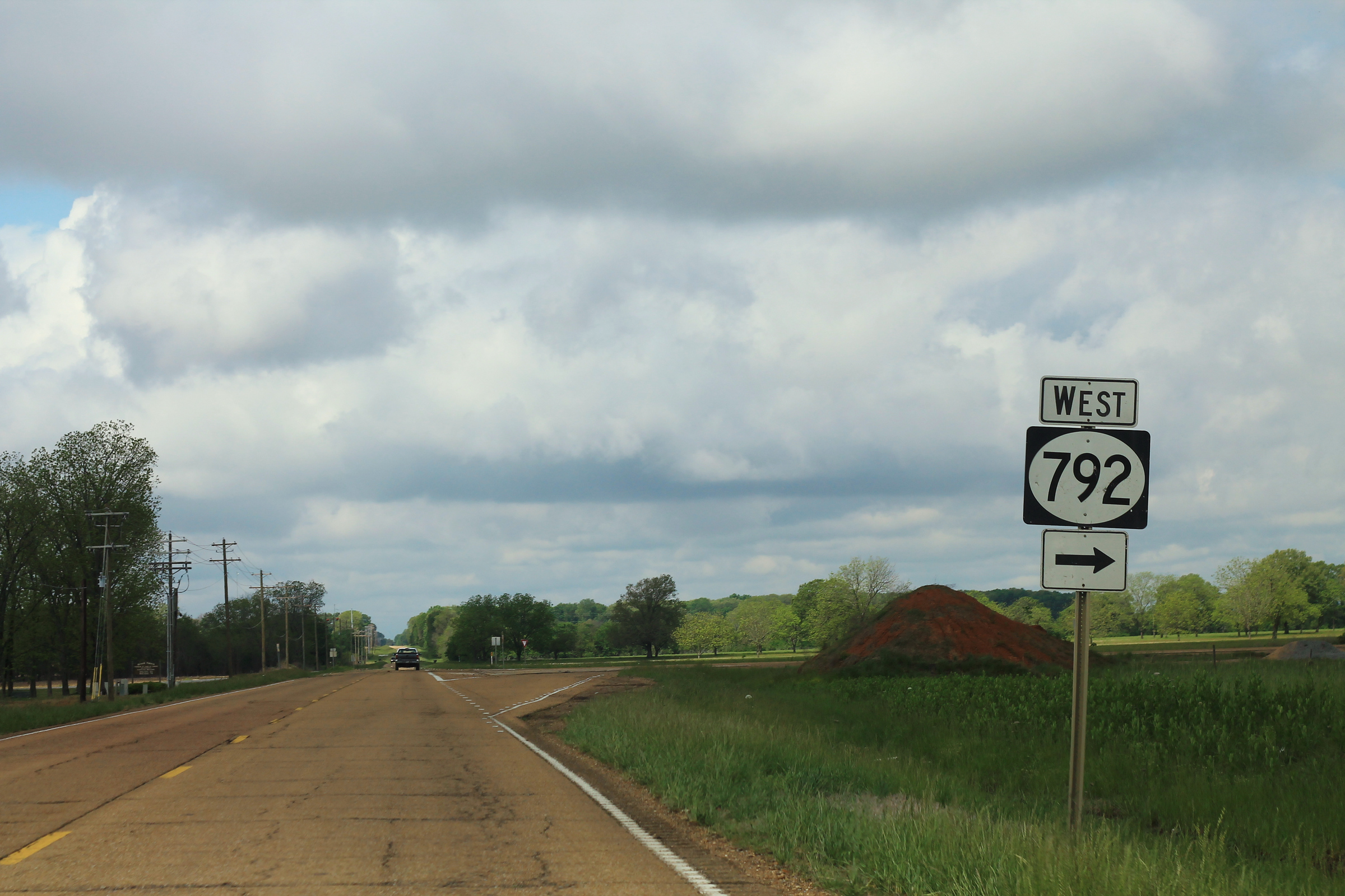 MS388 West - MS792 West Sign